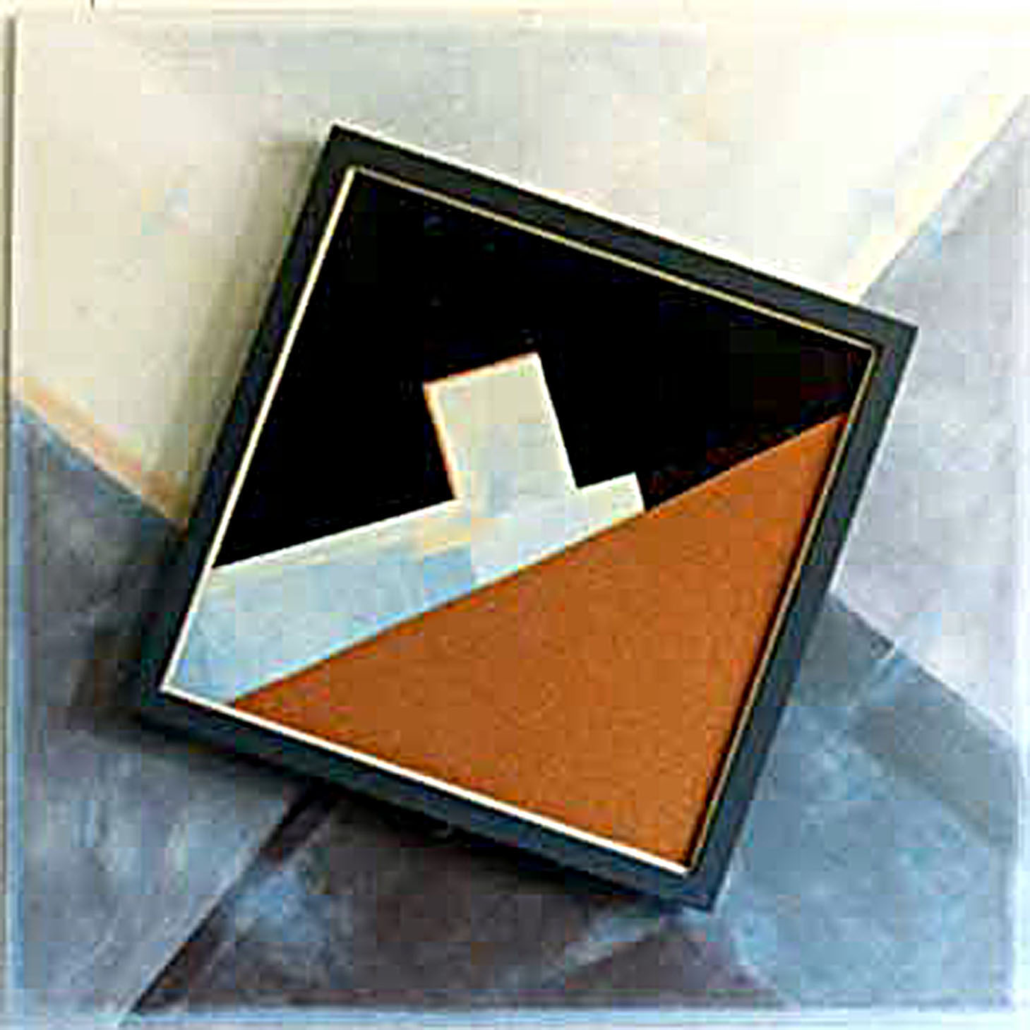 Template:Sandobjekt 1988,drehbar gelagert